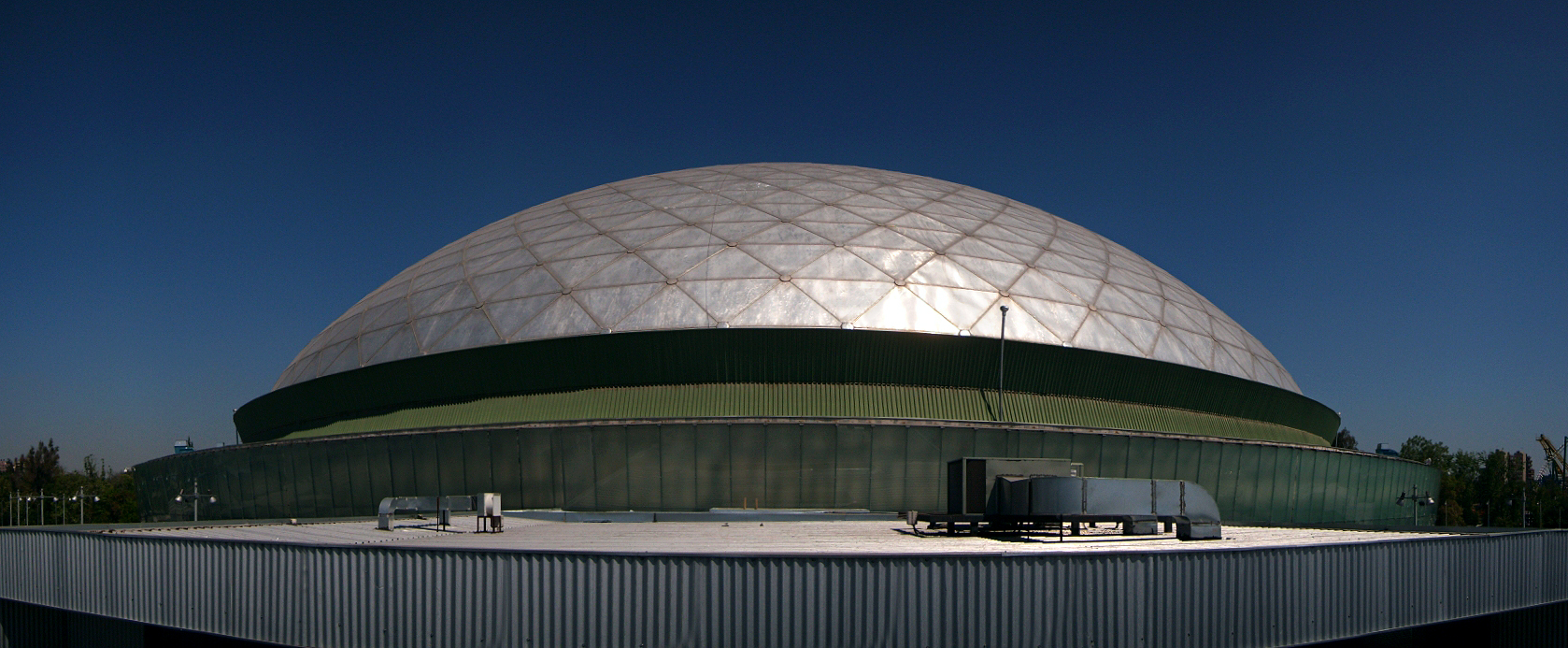 Panorámica de la cúpula del Movistar Arena, ubicado en la elipse del Parque O'Higgins en Santiago de Chile.